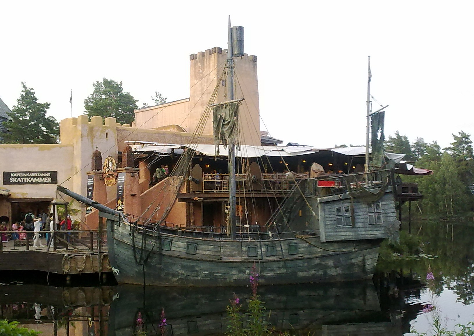 Skuta Grevinnen i Kristiansand Dyrepark